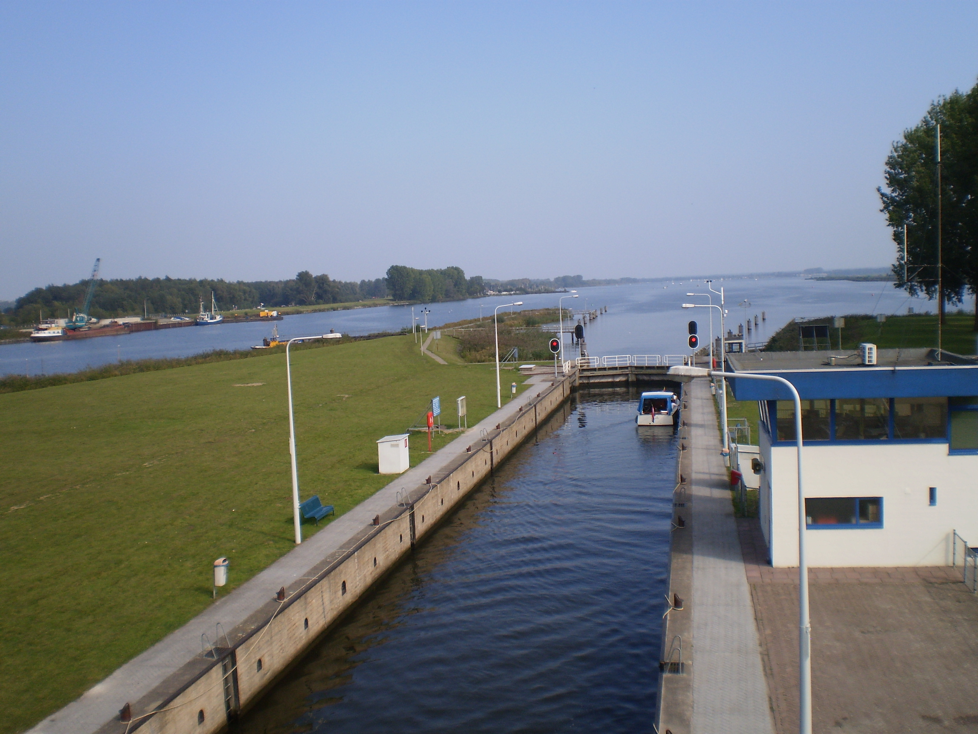 == Lisinsje: ==